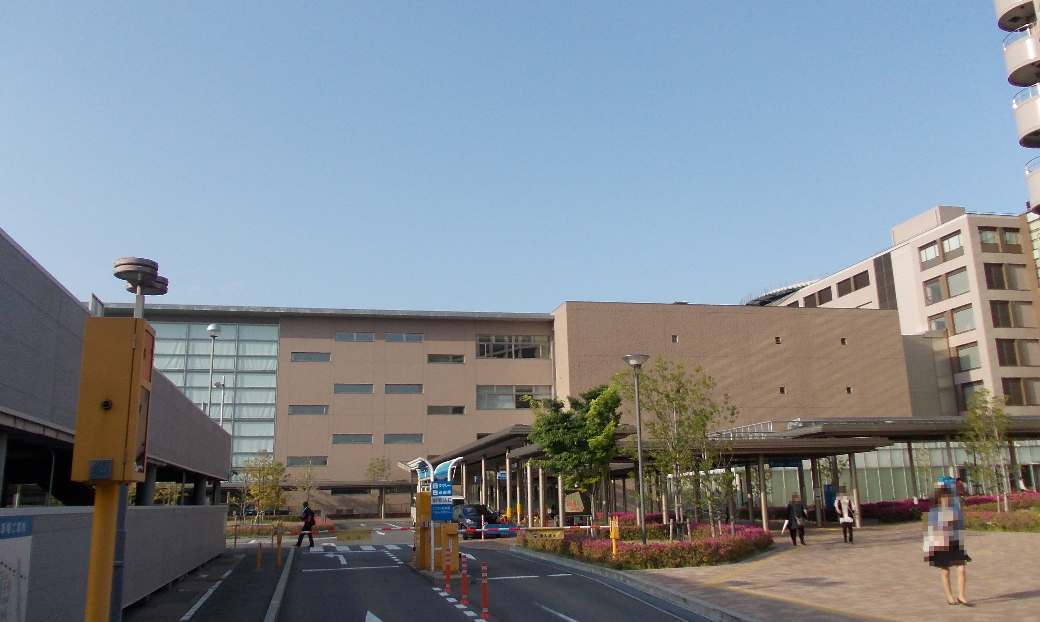 名古屋大学鶴舞地区